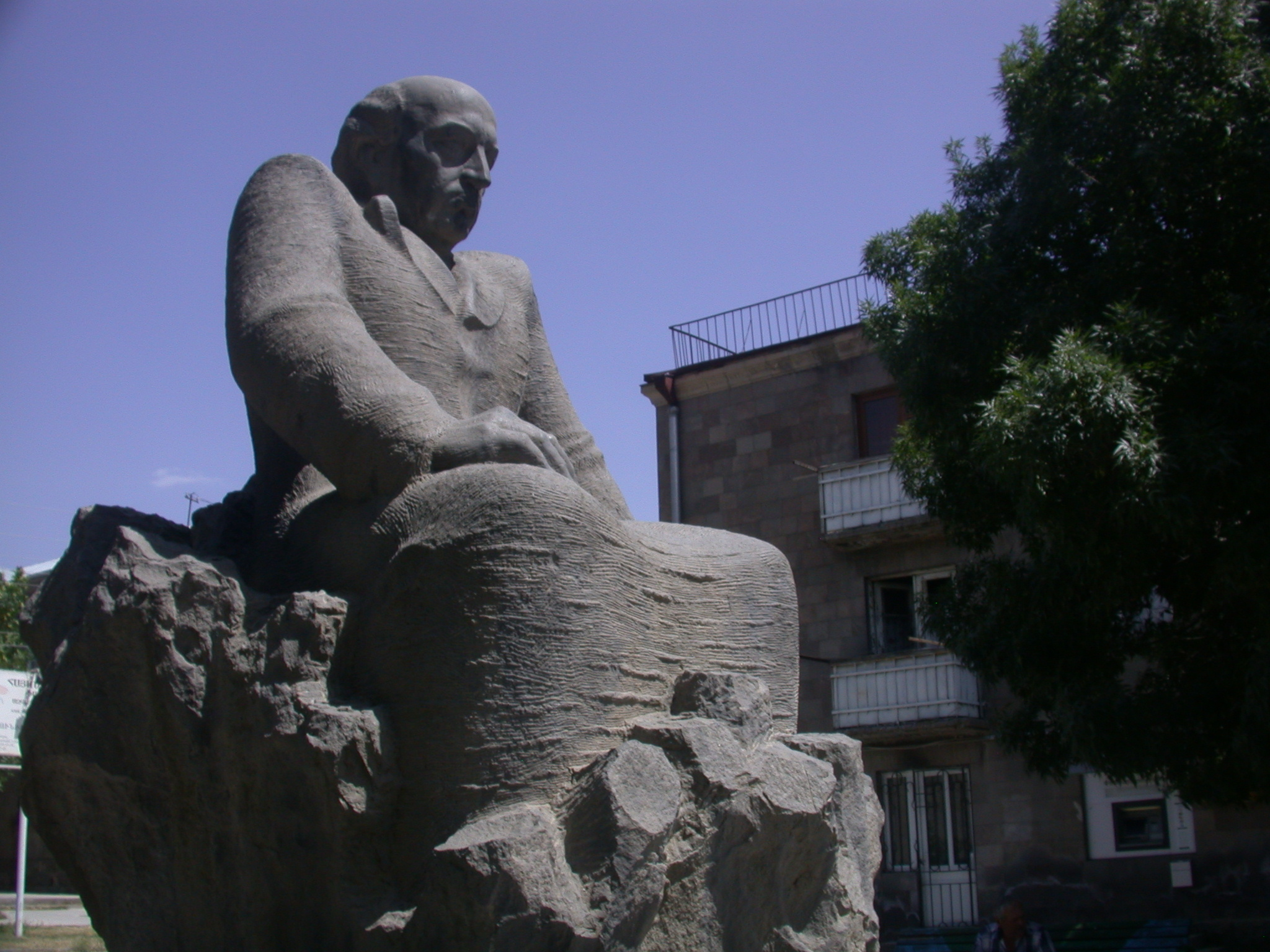 Համո Սահյանի հուշարձանը Սիսիանում 6/27